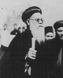 Pope Yousab II, 1947.